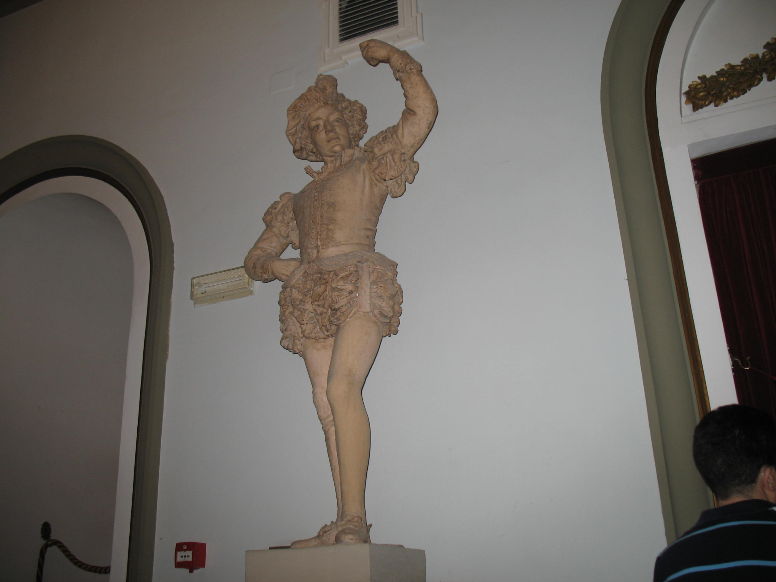 Statua posta all'ingresso del Teatro Marrucino di Chieti.